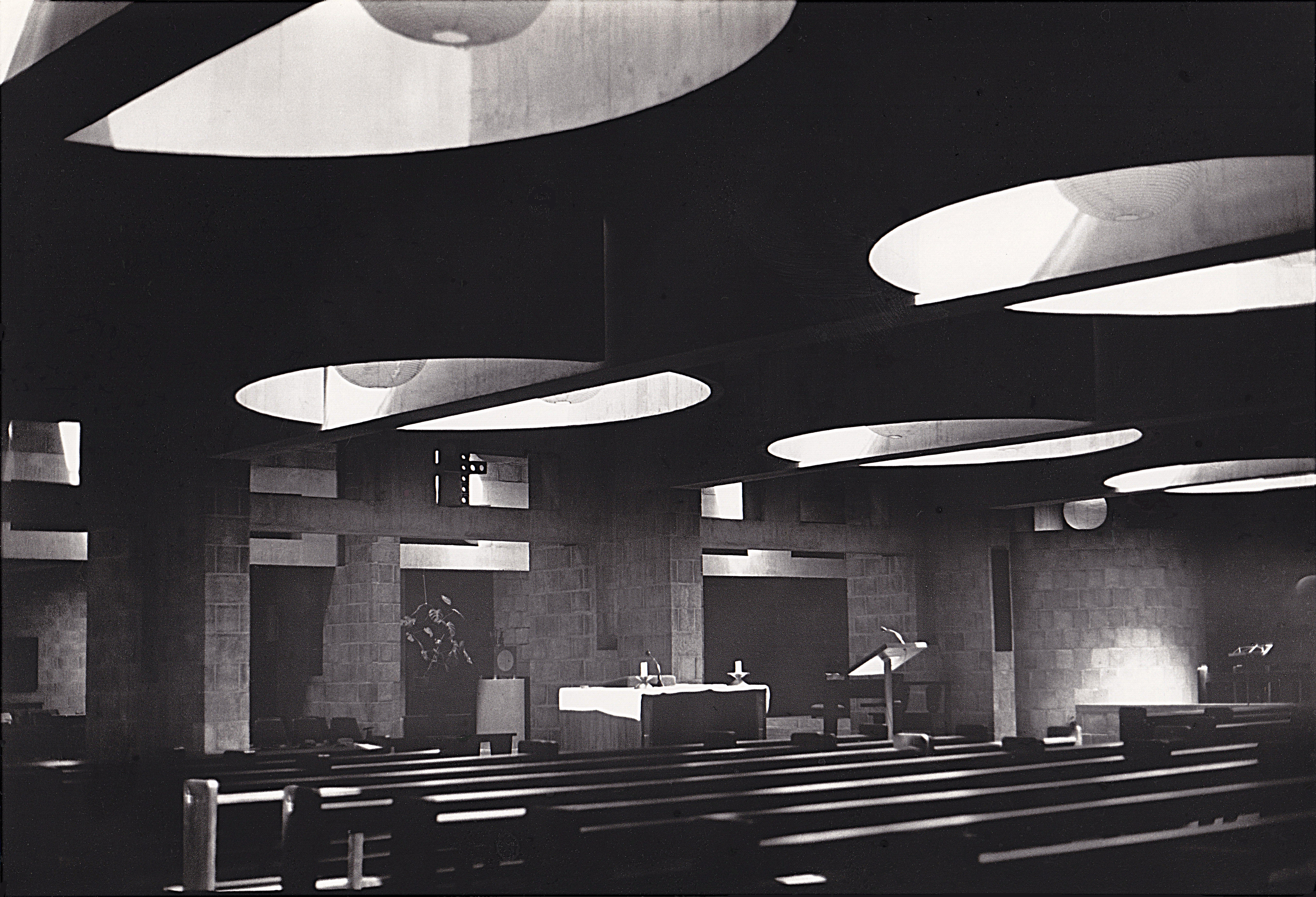 Pastoor van Arskerk, Aaltje Noorderwierstraat 6, Den Haag, (arch. Aldo van Eyck, bouwfase 1968-69).